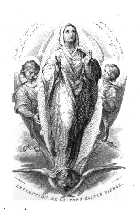 Image en tête du Paroissien complet selon le rite romain" imprimé par permission de Henri Marie Gaston de Bonnechose archevêque de Rouen, Fleury éditeur, Rouen, 1877.